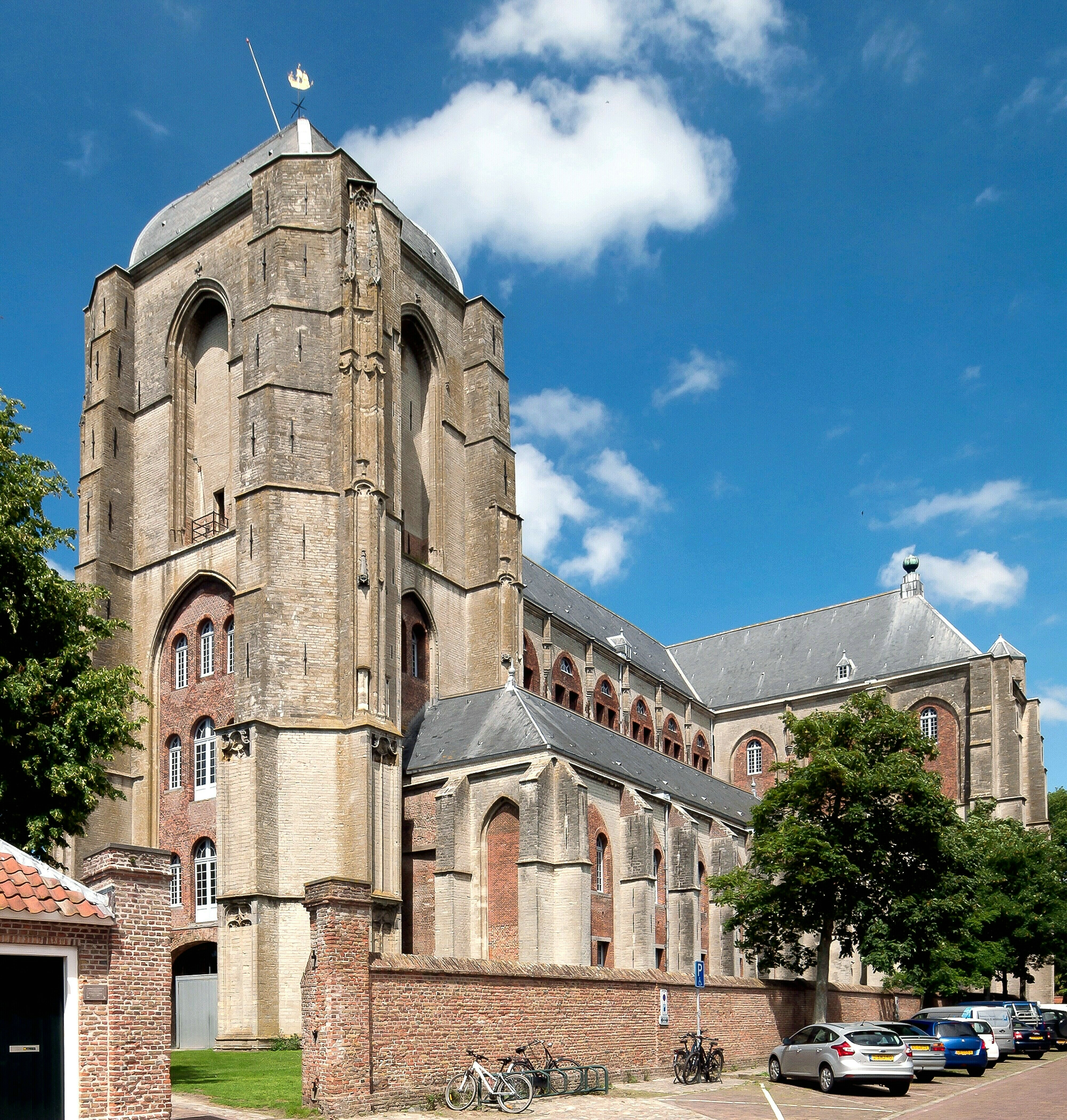 Zicht op een deel van de Grote Kerk in Veere